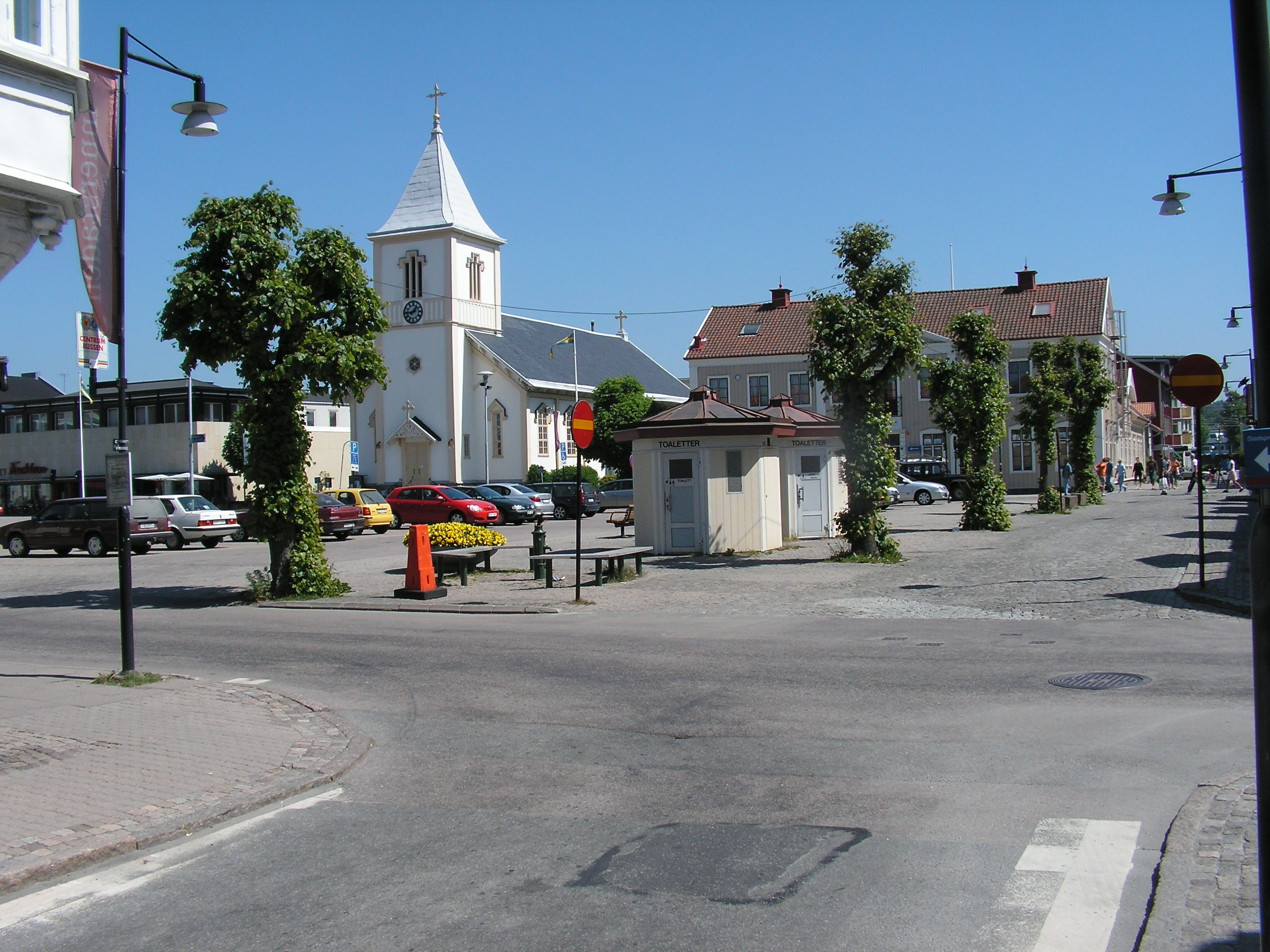 Stortorget i Kungsbacka. Foto Stefan Linder Stefan.lila 12 juni 2006 kl.12.59 (CEST)